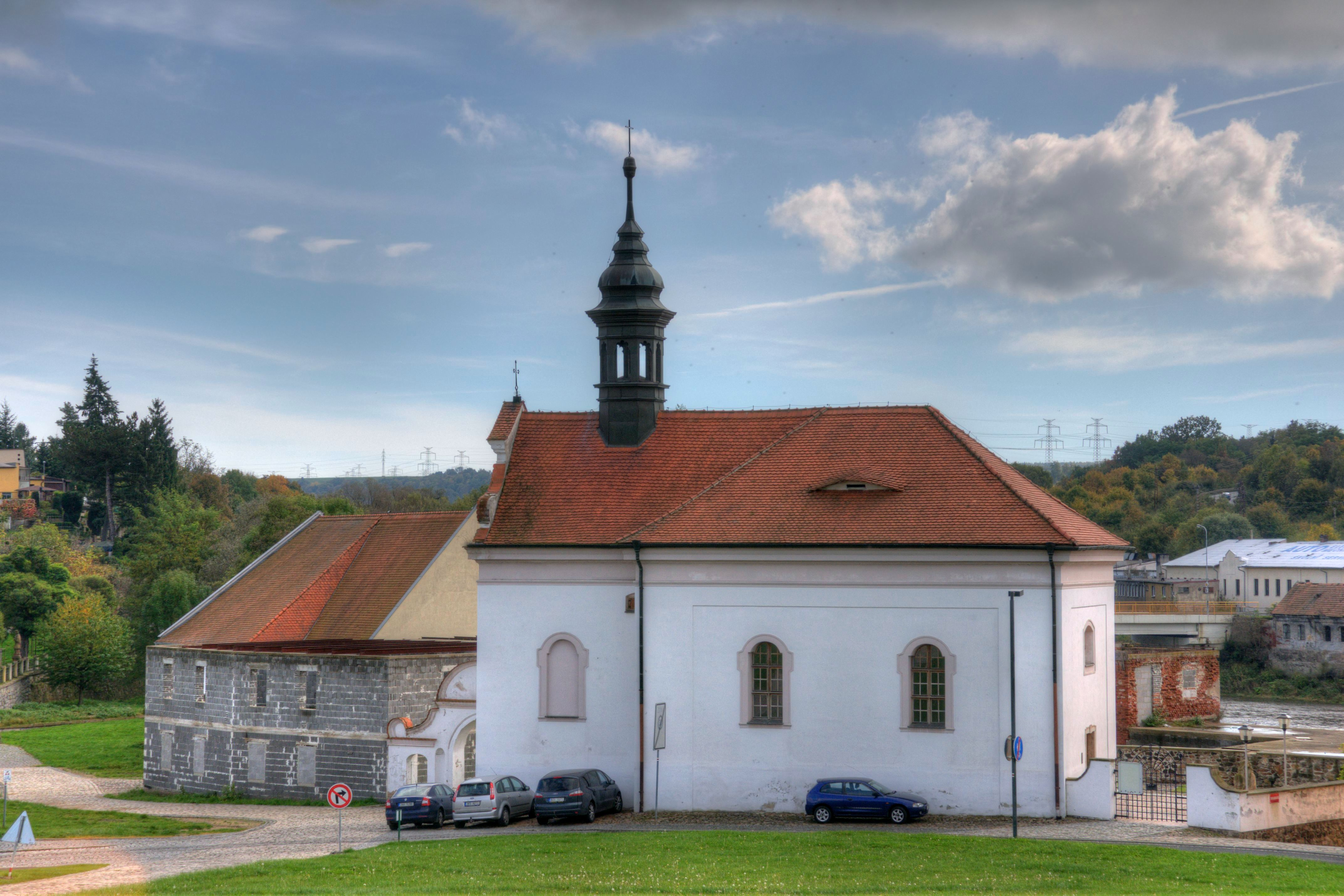 Kostel Stětí svatého Jana Křtitele, Říční, Kadaň.